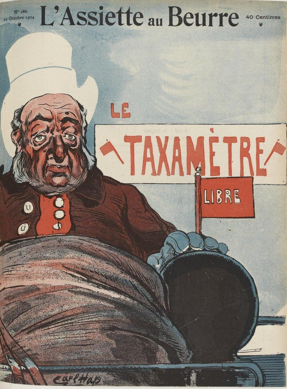 L'Assiette au beurre n° 186 spécial « Le taxamètre » 22 octobre 1904.